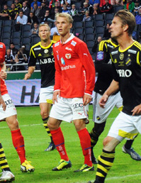 Sebastian Andersson